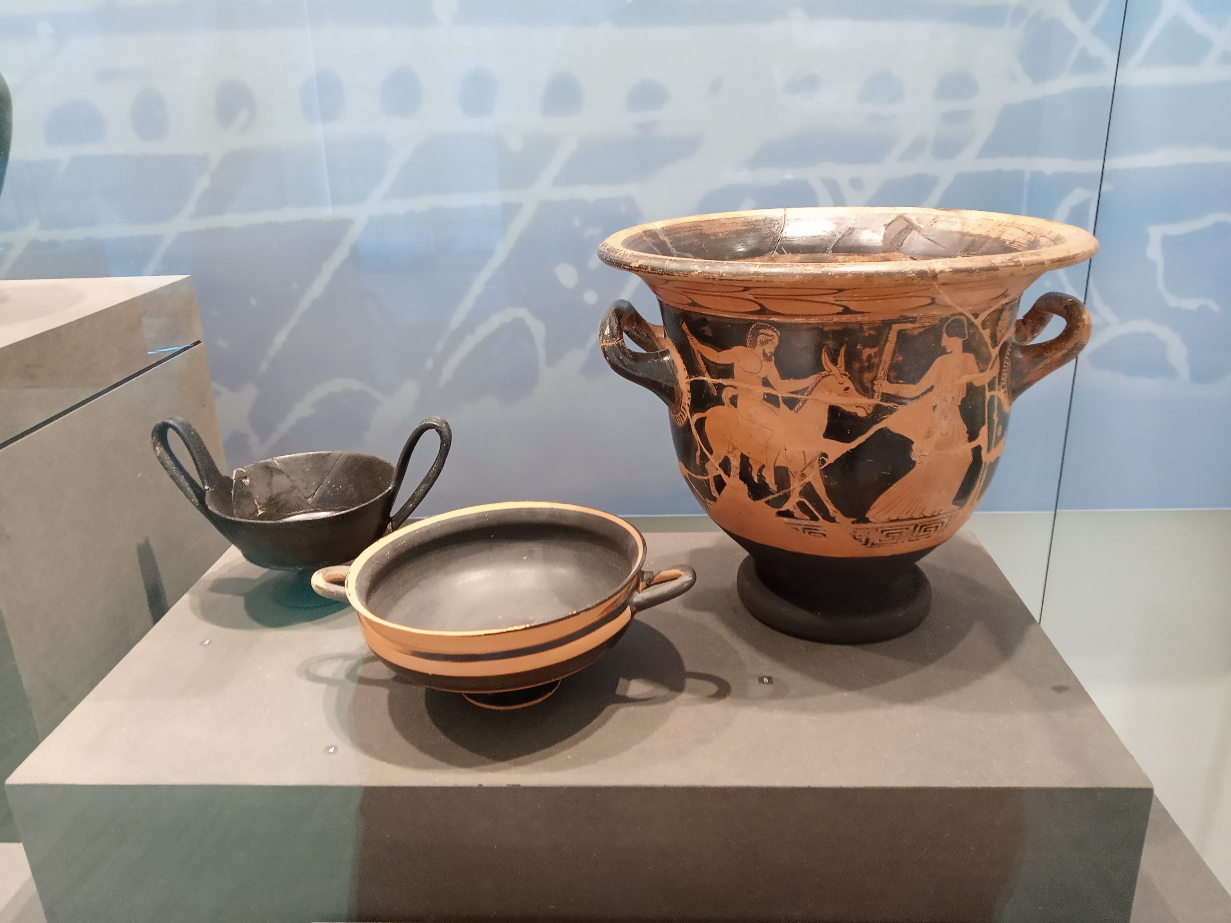 Археологічний музей Керкіри, греція, острів Керкіра